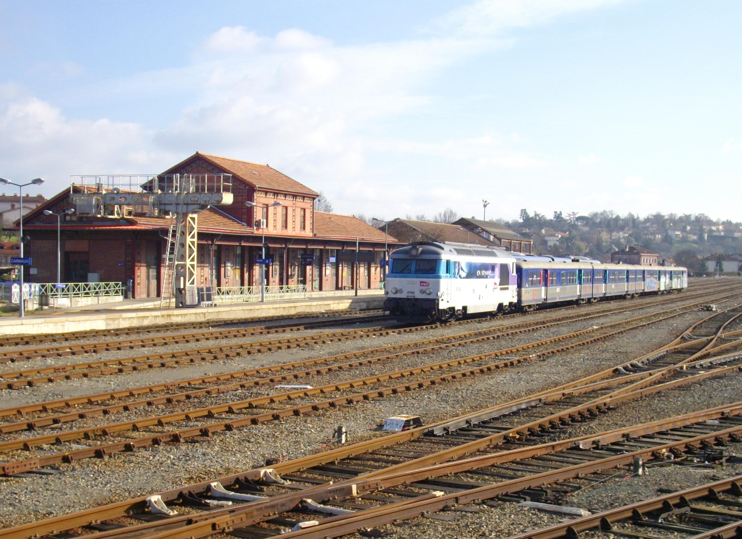 Façade arrière de la gare de Carmaux